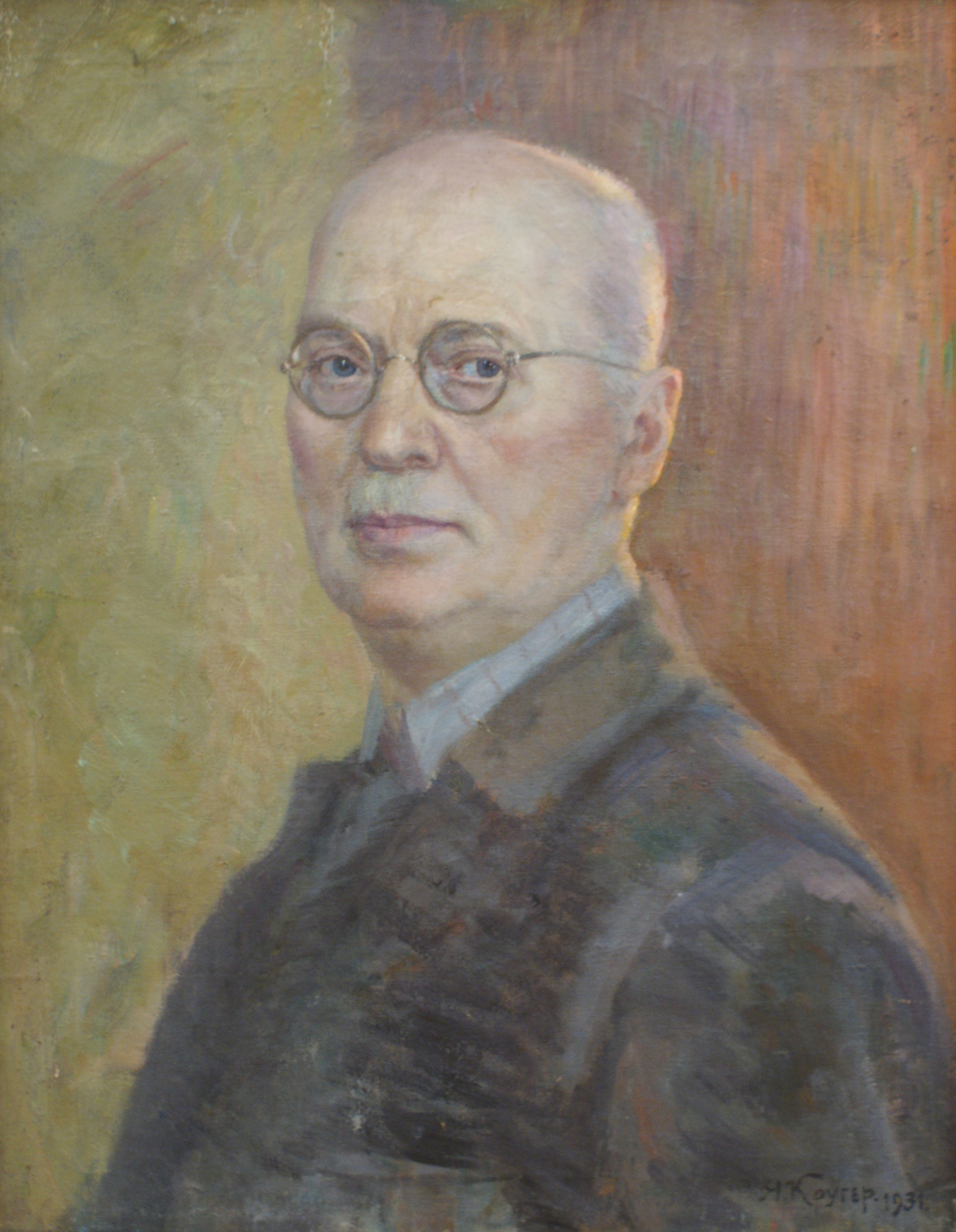 Аўтапартрэт "Апошні прамень"